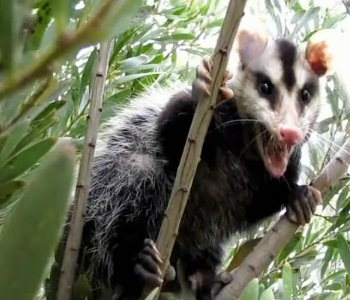 Zarigueya didelphis albiventris trepada al árbol